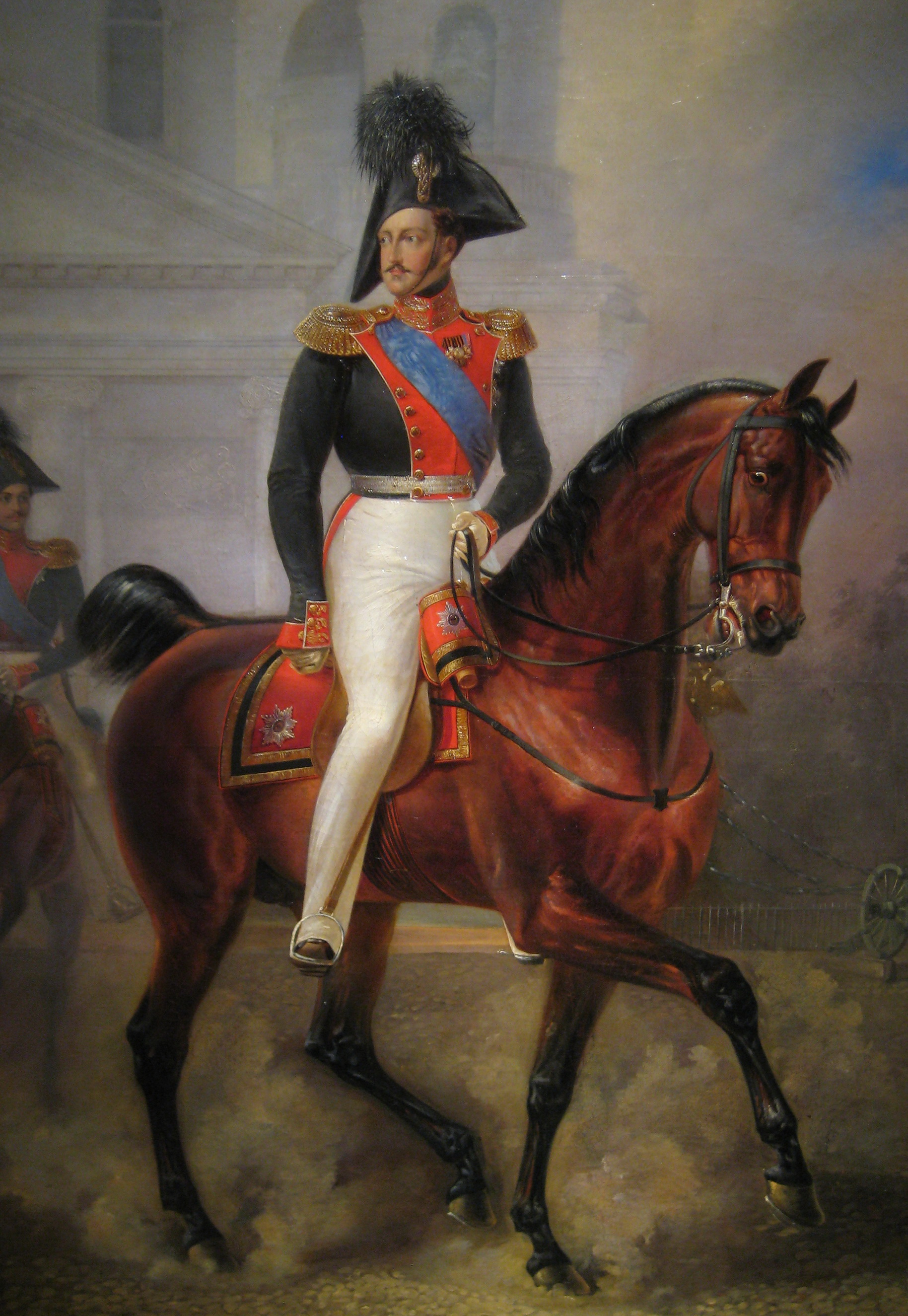 Выставка "Национальная портретная галерея", ГИМ, 2012